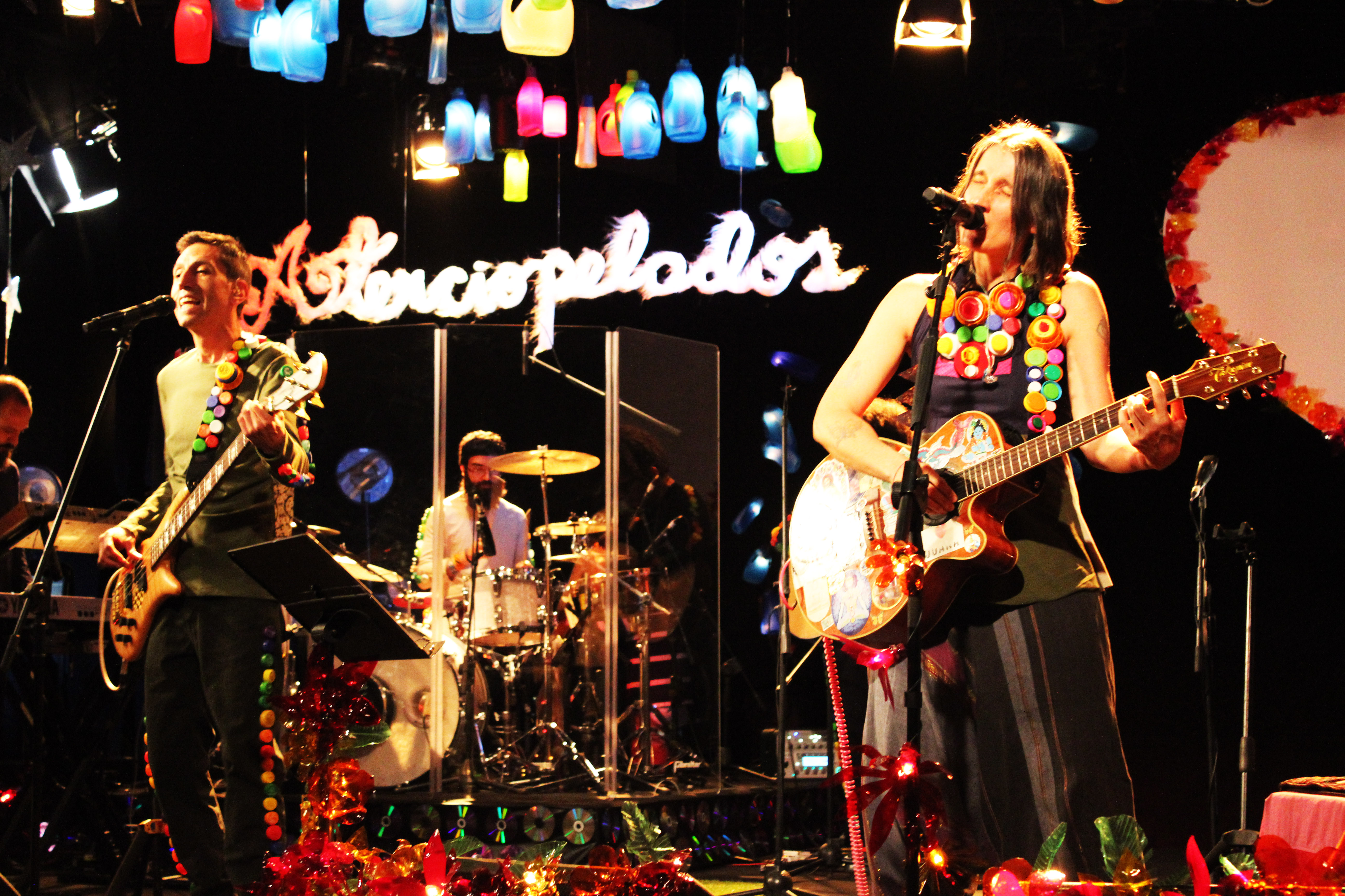 Foto: Juan Andrés Moreno